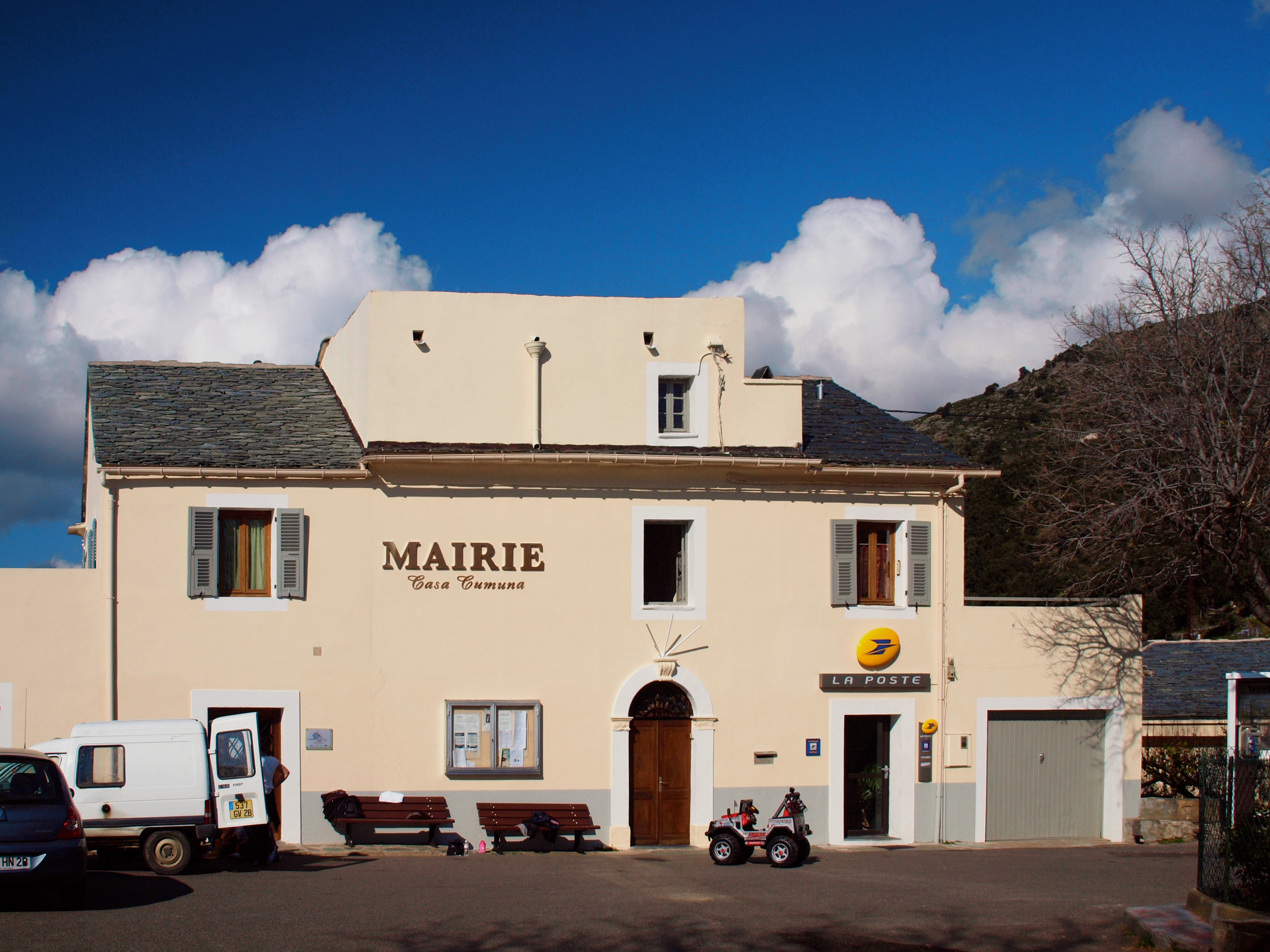 Canari (Corsica) - Mairie et bureau de la Poste place du Clocher